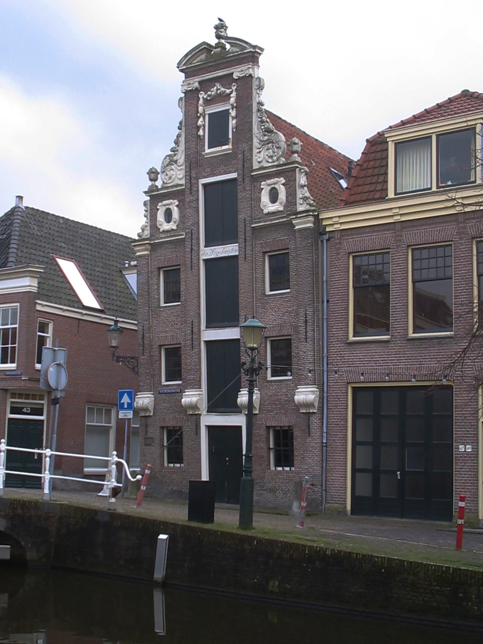 Alkmaar, De Vigilantie, Verdronkenoord 45, feb. 2006